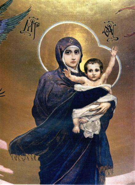 Богоматерь с младенцем